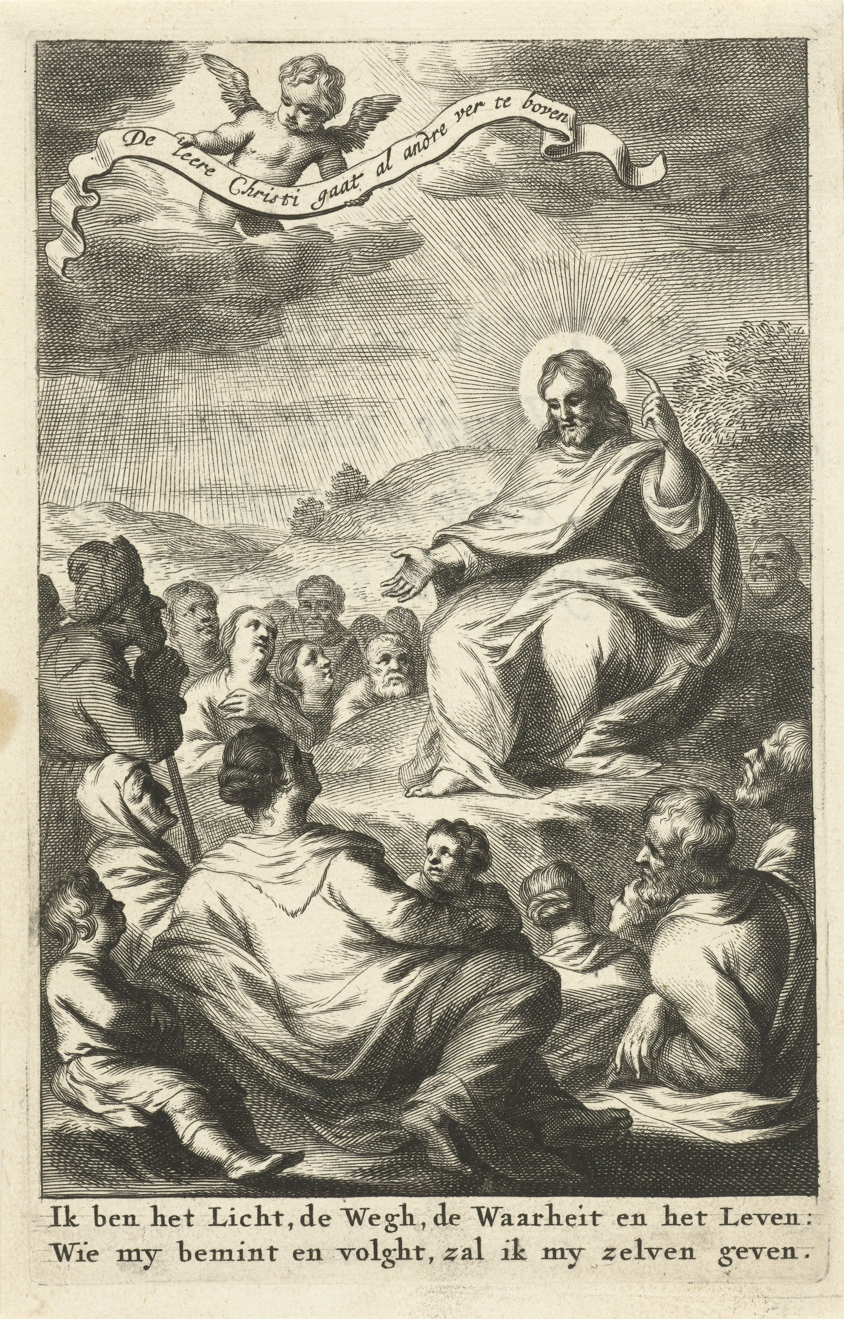 IdentificatieTitel(s): De BergredeObjecttype: prent boekillustratie Objectnummer: RP-P-1886-A-10418Opschriften / Merken: verzamelaarsmerk, verso, gestempeld: Lugt 2228Omschrijving: Christus houdt zijn bergrede voor menigte. Een kleine engel zweeft in de lucht met een tekstband. In de marge onder twee regels uit de bergrede.VervaardigingVervaardiger: prentmaker: Cornelis van Dalen (I)verkoper: Jacob LescaillePlaats vervaardiging: AmsterdamDatering: 1663Fysieke kenmerken: gravureMateriaal: papier Techniek: graveren (drukprocedé)Afmetingen: plaatrand: h 155 mm × b 100 mmToelichtingBoekillustratie uit: Thomas à Kempis (vertaler: Jurriaen Bouckart ), De vier boeken der naarvolging Christi, Jacob Lescailje (uitgever), Amsterdam 1663OnderwerpWat: Christ's sermon on the mount (Matthew 5-7)Verwerving en rechtenVerwerving: aankoop 20-apr-1886Copyright: Publiek domein